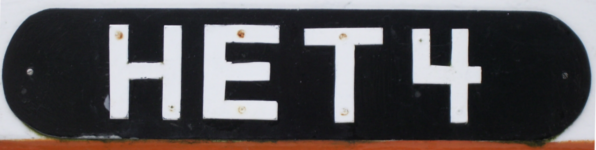 Deutsches Fischereikennzeichen für die Gemeinde Hetlingen im Kreis Pinneberg